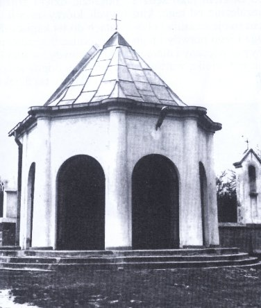 Ossów kaplica 01